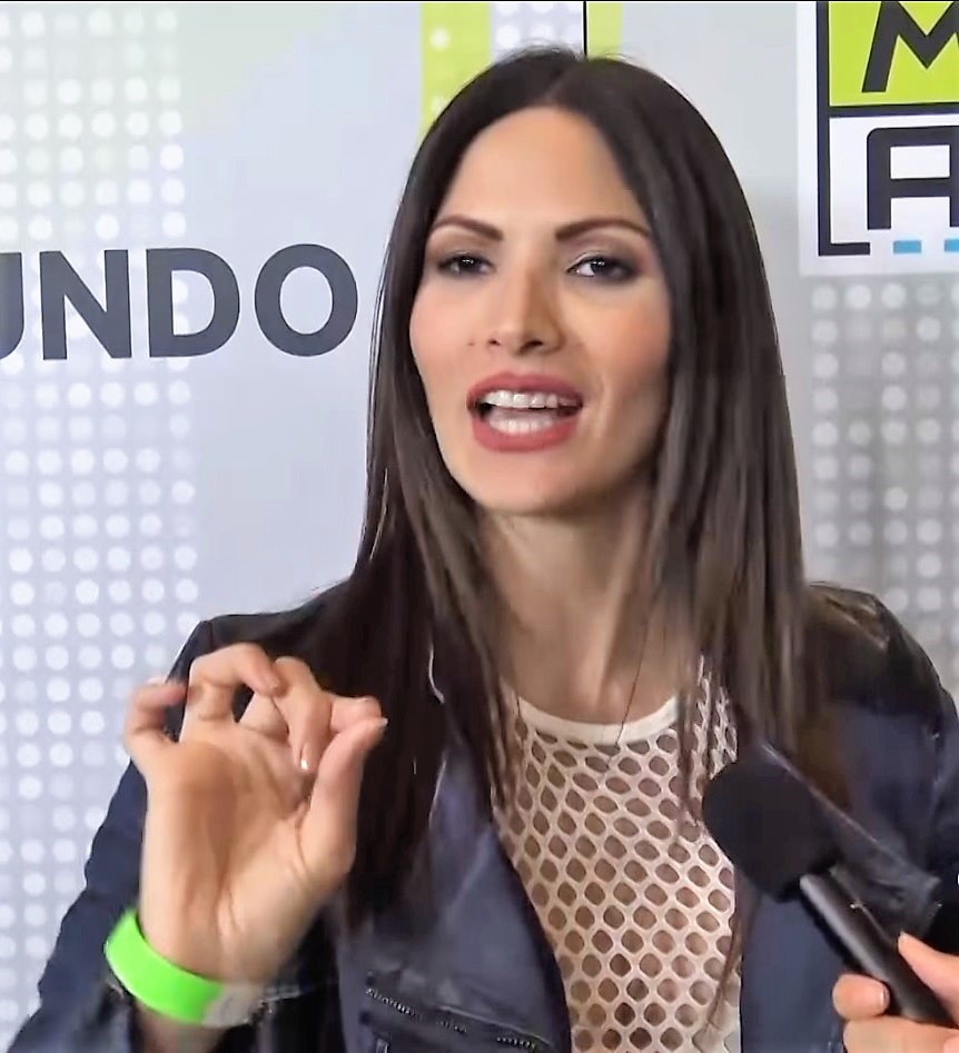 🍭 La Miss Universo "Cynthia Olavarria" elige entre Ulices Chaidez, Christian Nodal o Gerardo Ortiz by Dulce Osuna